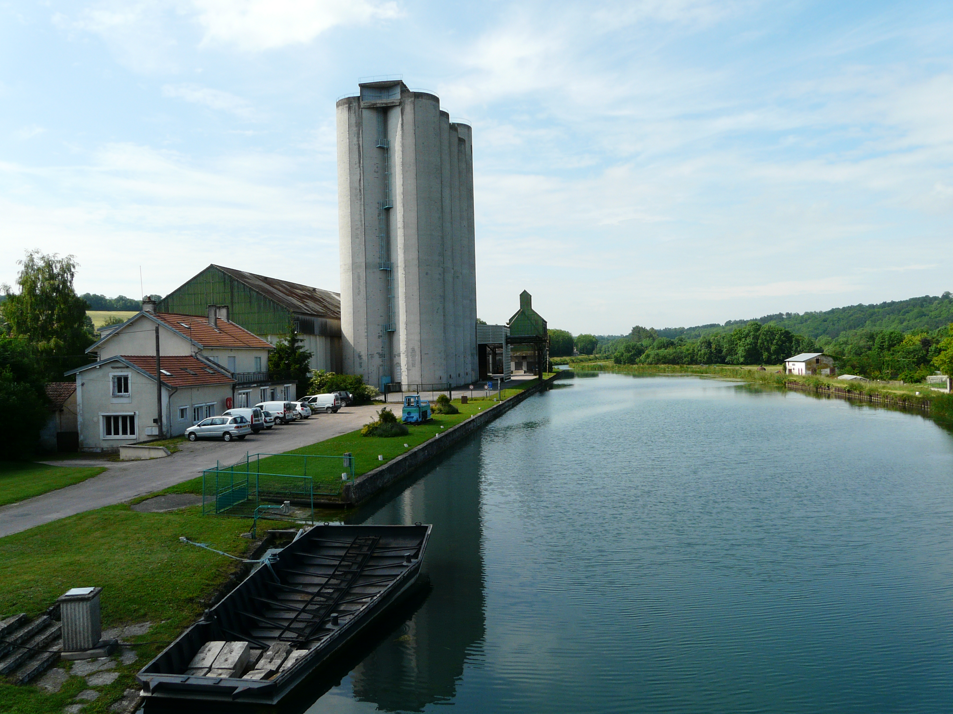 Canal de la Marne au Rhin et silo de la Coopérative Agricole Lorraine à Void-Vacon (Meuse, France)